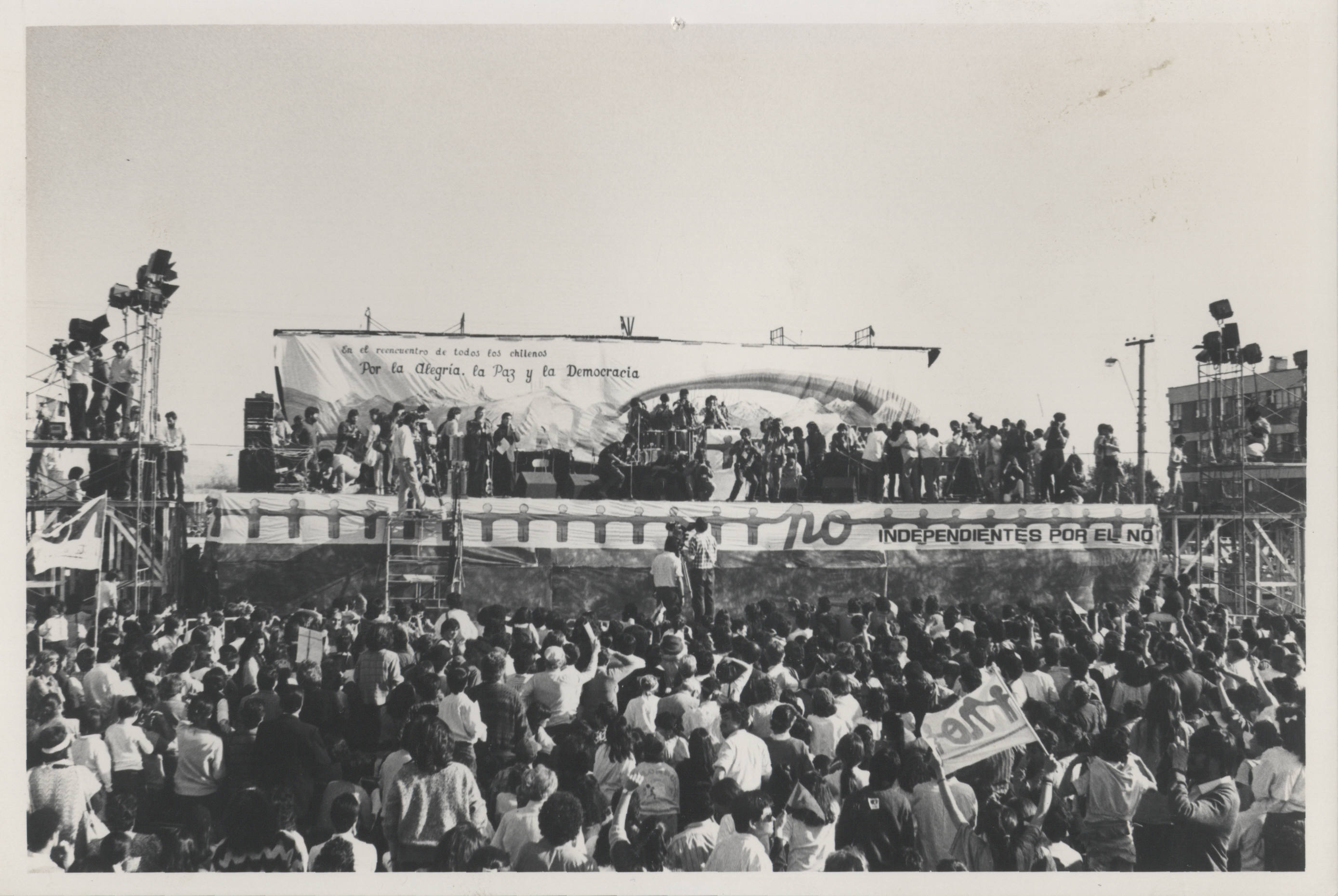 Convocados bajo el lema "A La Bandera con una sola bandera" el movimiento de los Independientes por el No reunió a miles de seguidores en el Parque La Bandera (comuna de San Ramón) en su celebración de cierre. El único orador del encuentro fue Alejandro Hales Jamarne, presidente del comando organizador y presidente del Colegio de Abogados. En el escenario se presentaron los grupos Inti Illimani e Illapu, recientemente regresados del exilio.